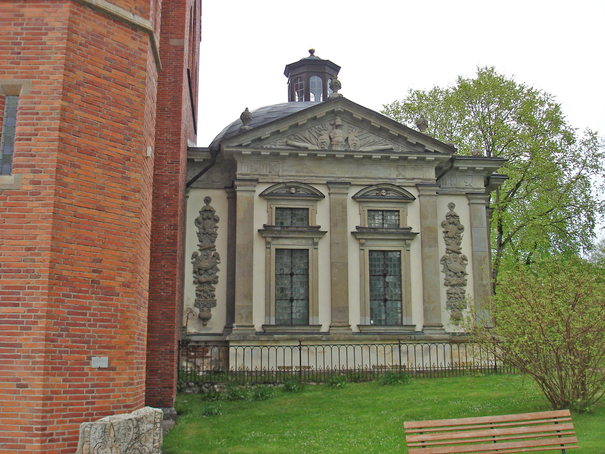 Fotat av församlingsmedlem (tompen0000), 2006